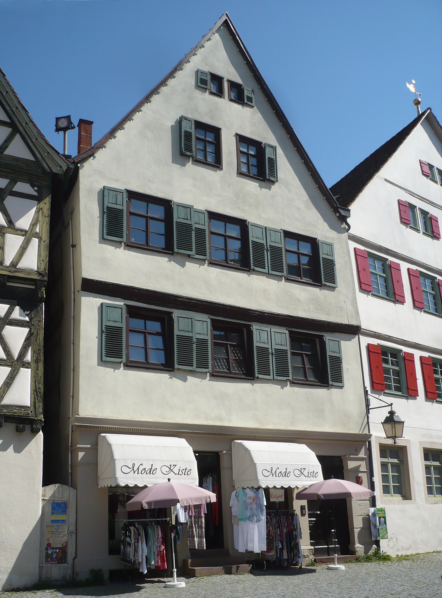 Haus Gutscher, einst Paulus, Marktplatz 6, Markgröningen